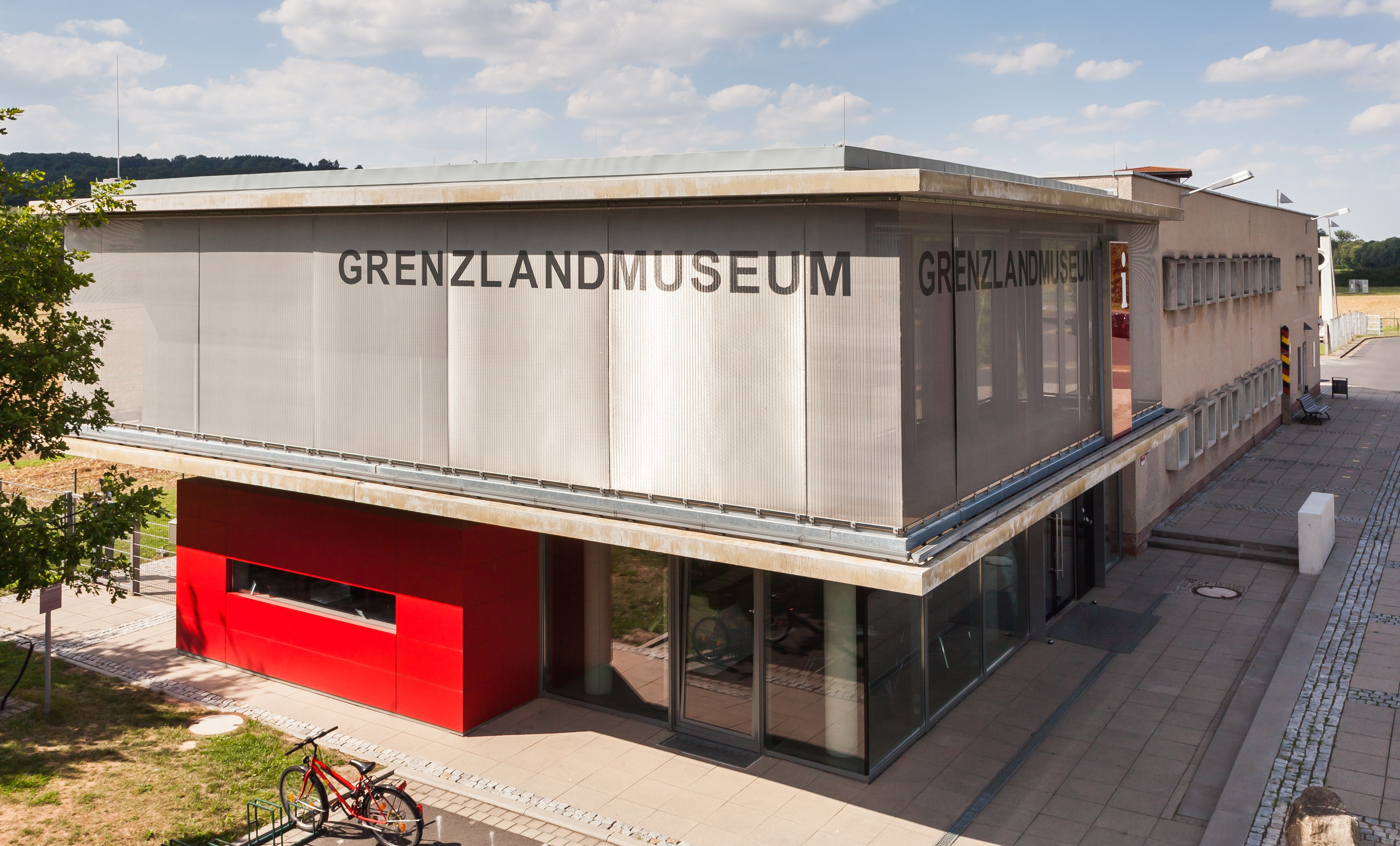 Das Grenzlandmuseum 2013